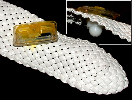 Mechanisches Diebstahlsicherungsetikett